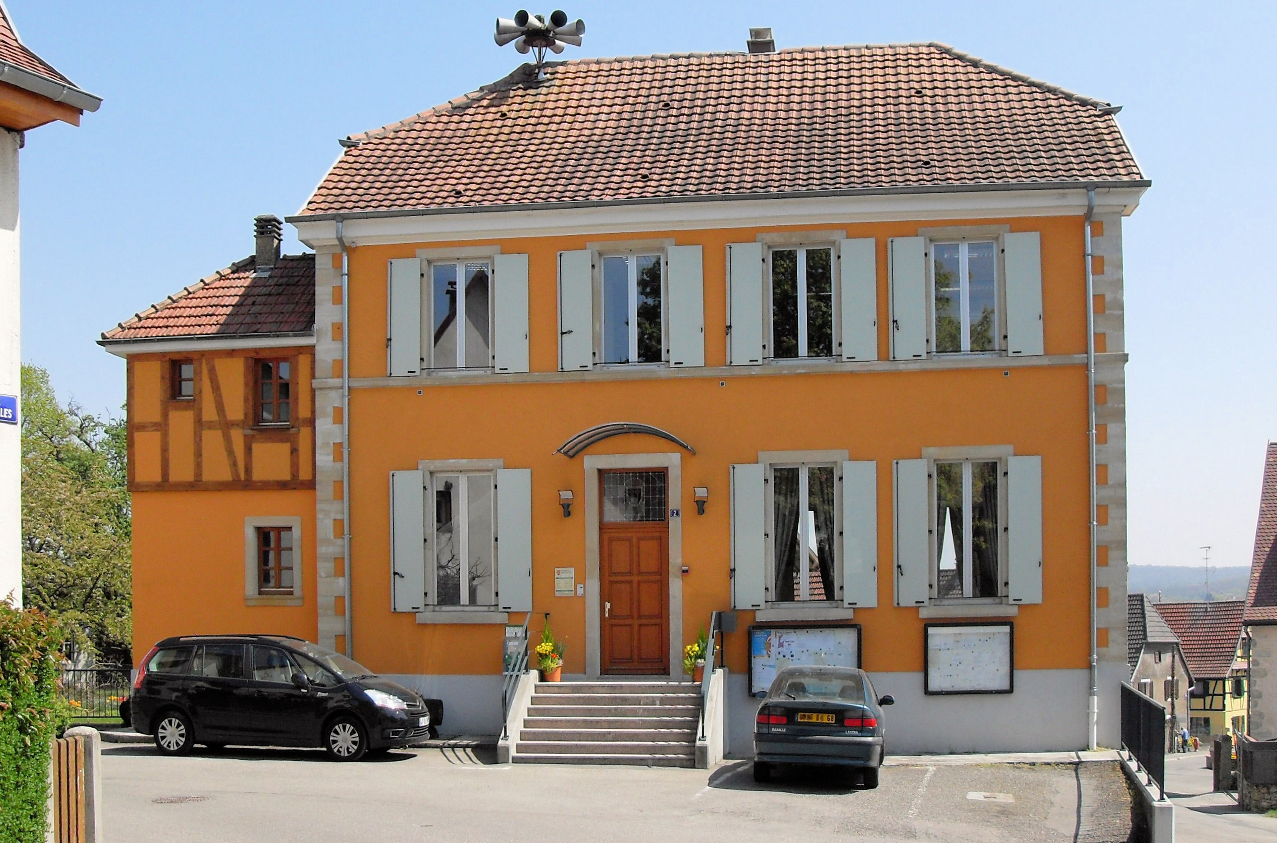 La mairie de Hochstatt